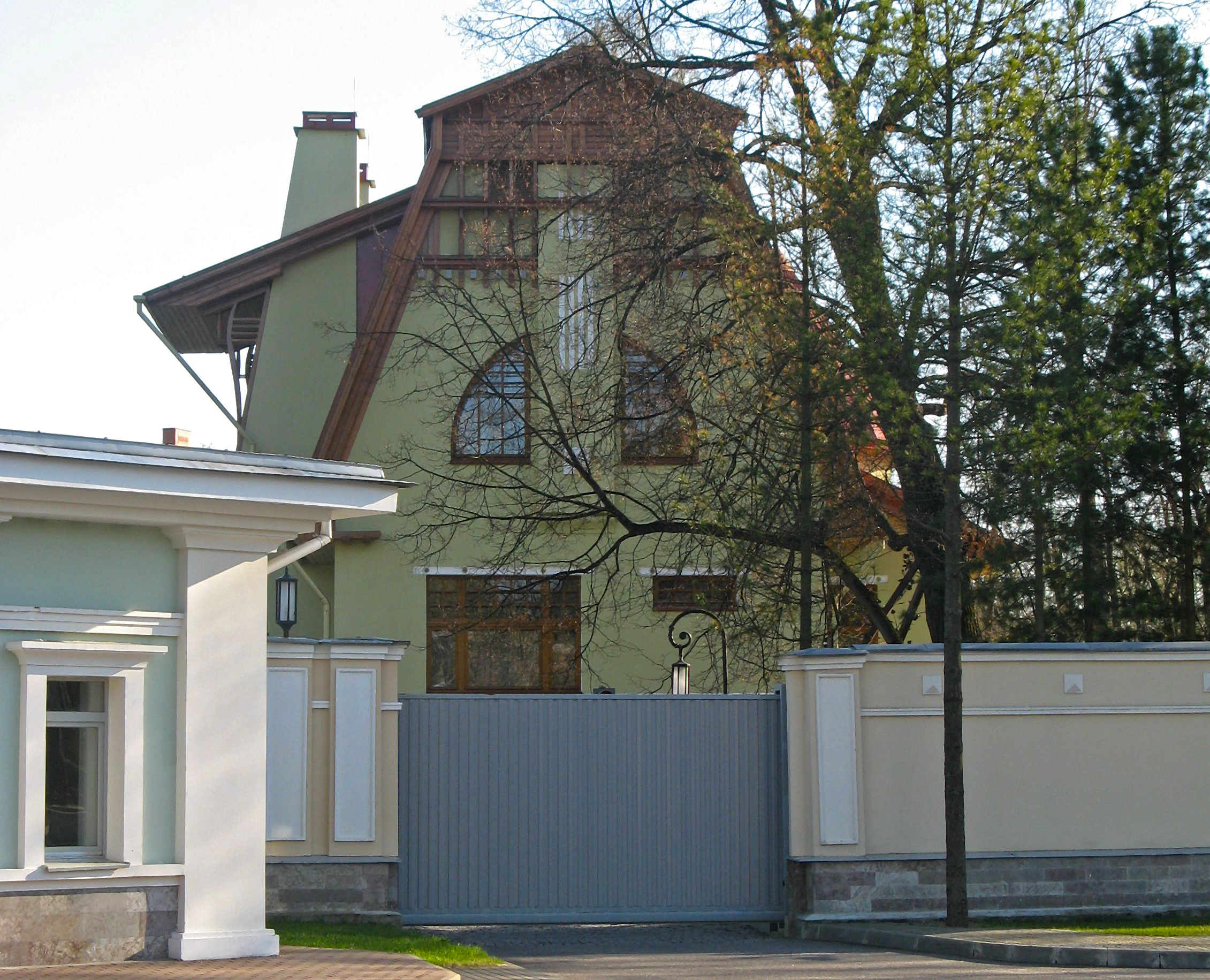 Усадьба В.И. Шёне: Каменный остров, Сквозной проезд, 3, на пересечении с Театральной аллеей, Петроградский район, Санкт-Петербург